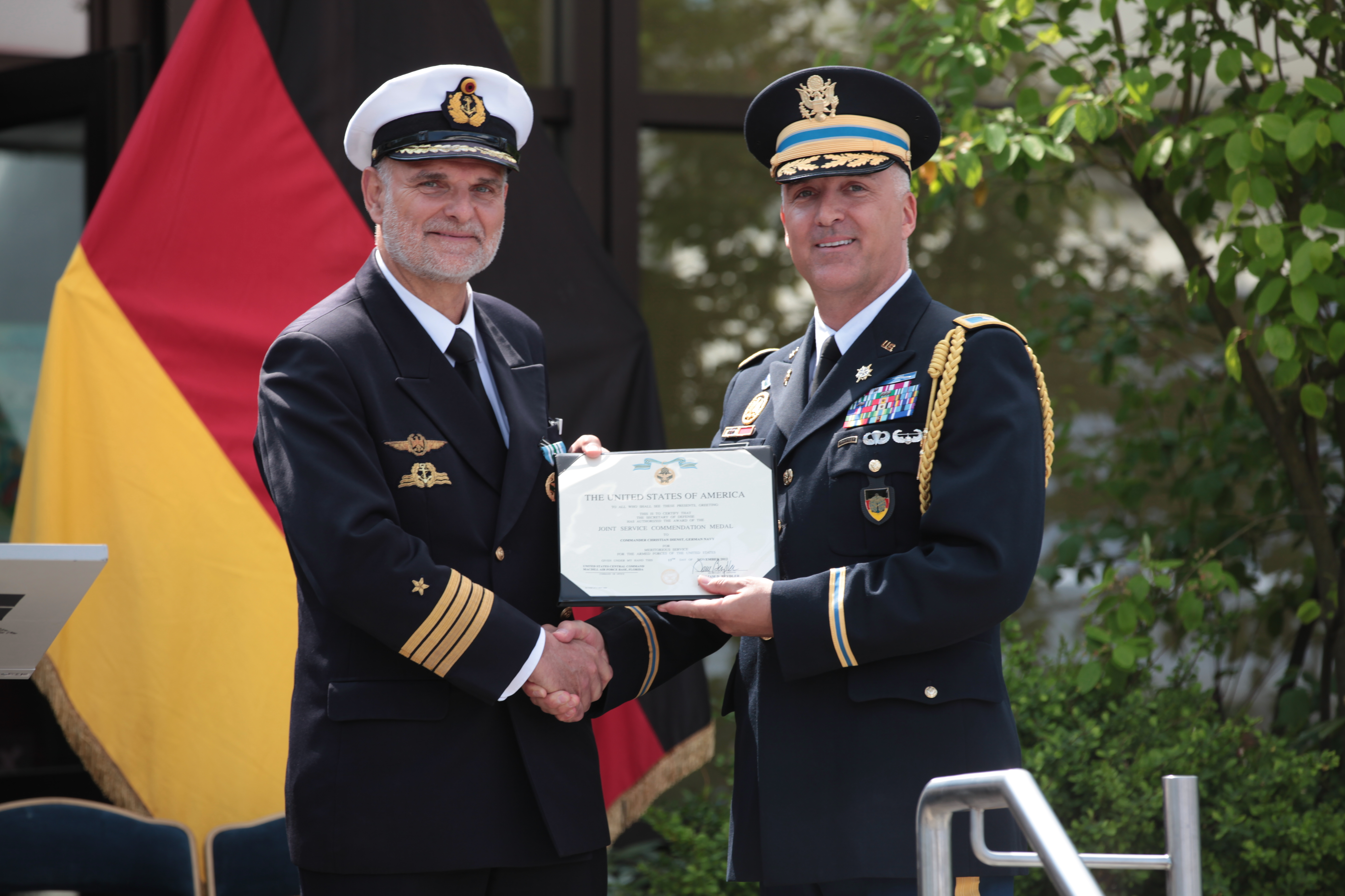 Kapitän zur See Christian Dienst & Colonel Terry L. Anderson, Armed Forces Day in Berlin, 2016